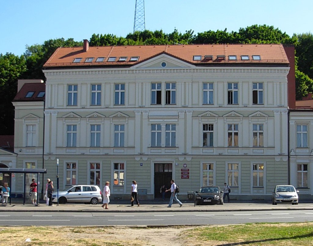 Prokuratura Rejonowa w Bydgoszczy, kamienica Nowy Rynek 10